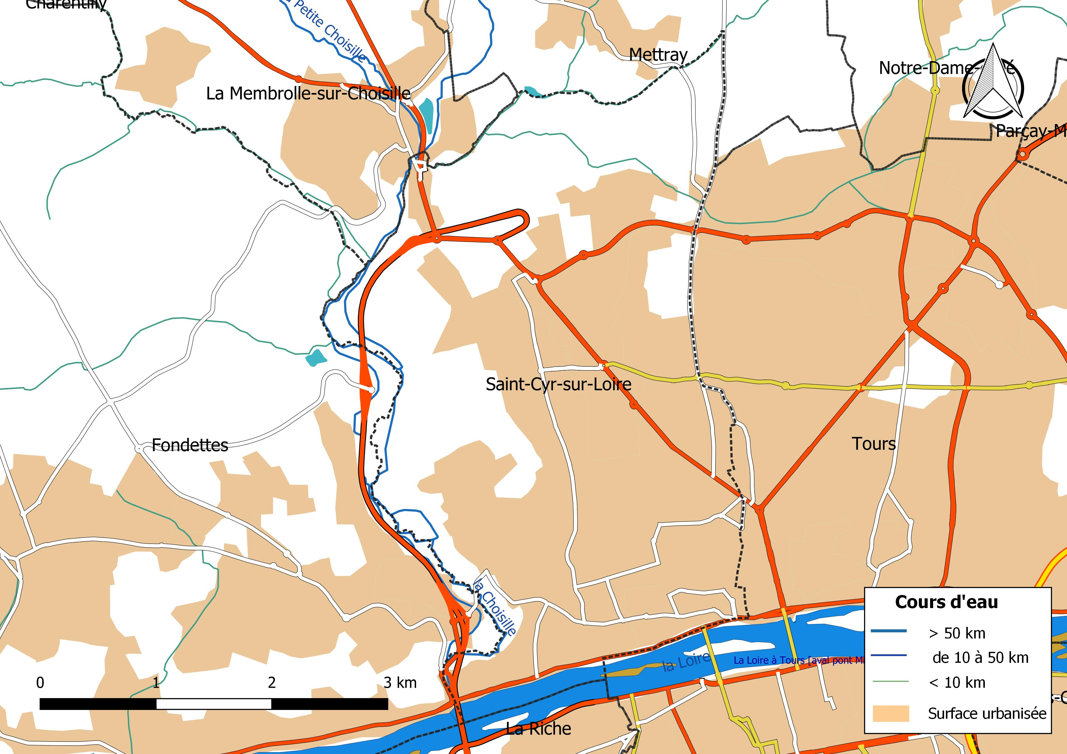 Carte du réseau hydrographique de la commune de Saint-Cyr-sur-Loire (France).